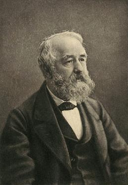 Johann Rudolf Wolf (1816 bis 1893) war ein Schweizer Astronom und Mathematiker